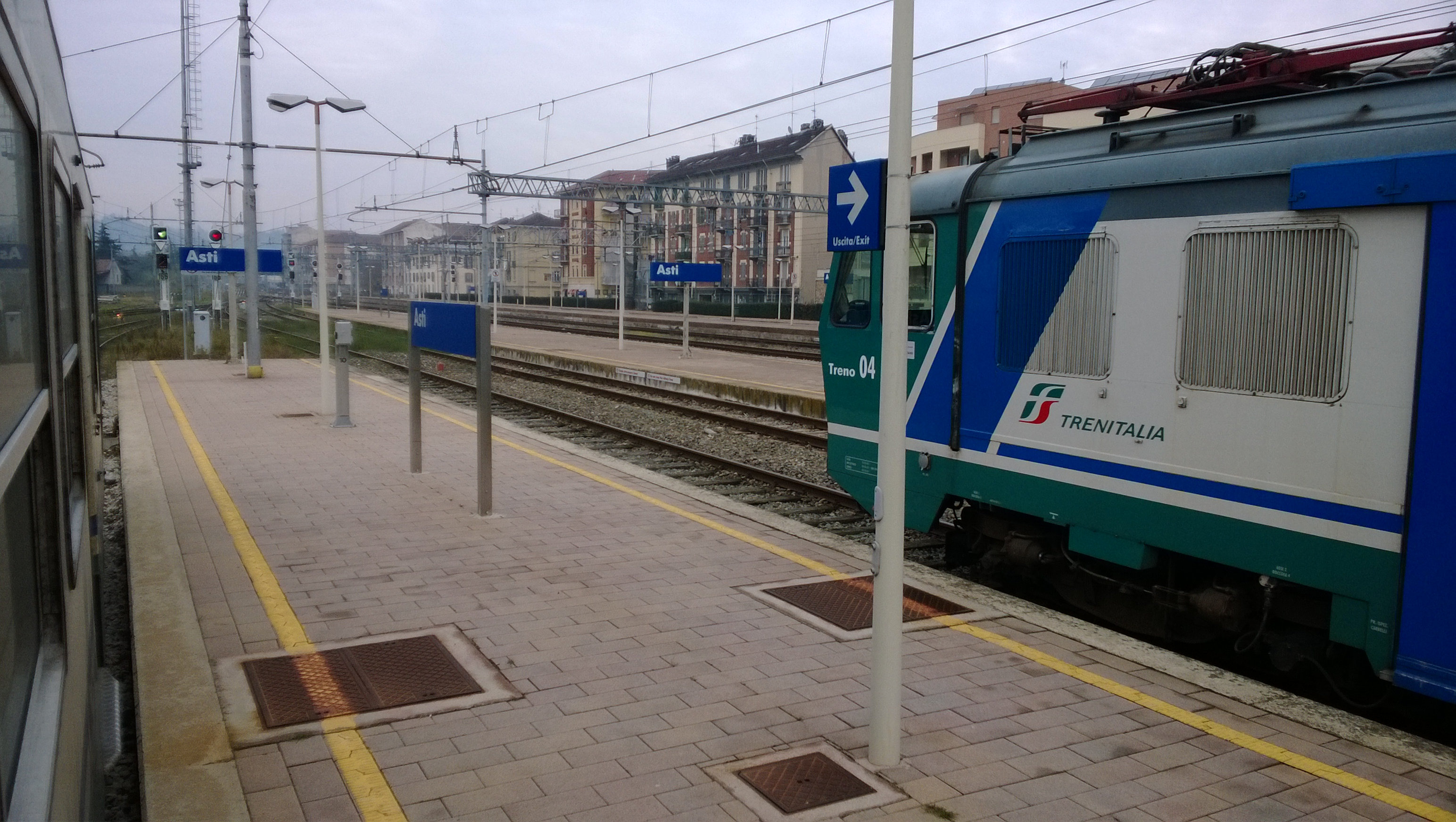 Scorcio della stazione di Asti con automotrice FS ALe 724.